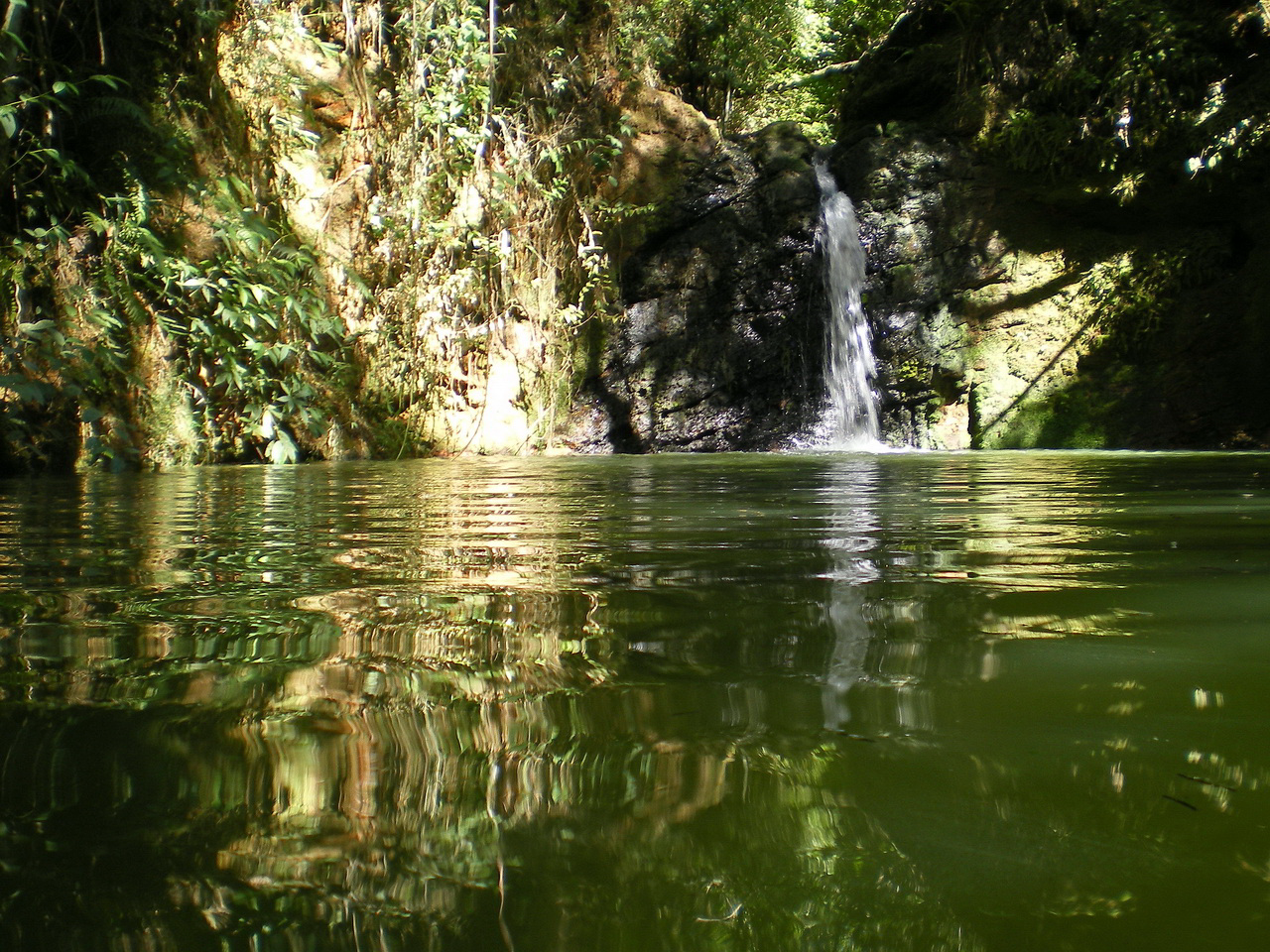 Fotos tomadas por mí, a inicios del año 2008 pequeña cascada de tatiyupi